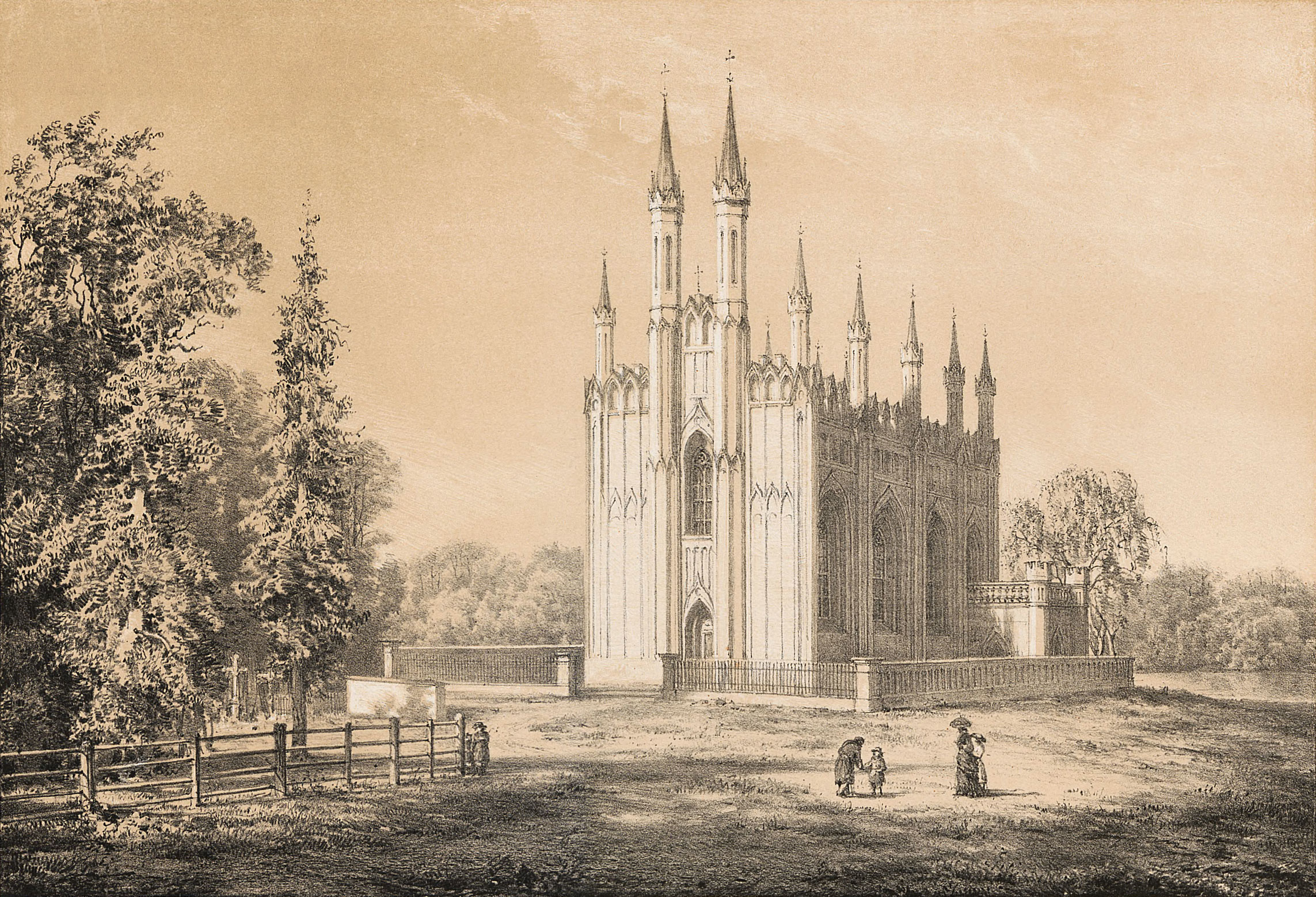 Беларуская (тарашкевіца): Сар’я (Sarja), капліца-пахавальня Лапацінскіх (Łapacinski)